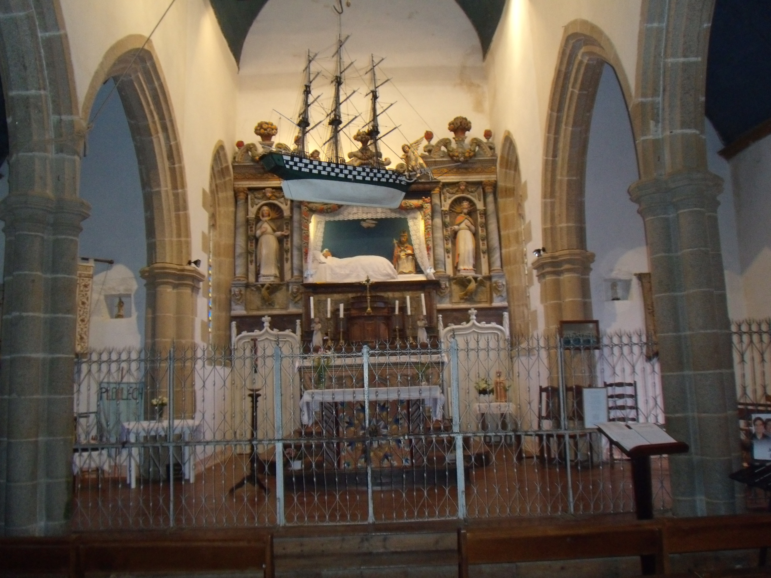 Ploulec'h (Côtes-d'Armor, Bretagne, France), hameau Le Yaudet, chapelle Notre-Dame du Yaudet, maître-autel et retable de la Vierge couchée.